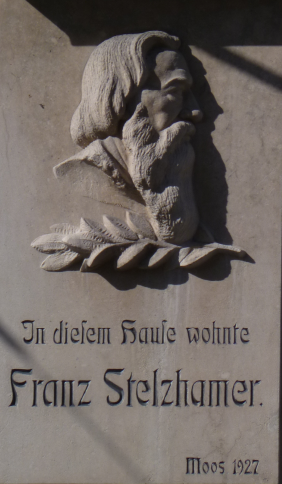 Stelzhammer Gedenktafel in der Müllner Hauptstraße